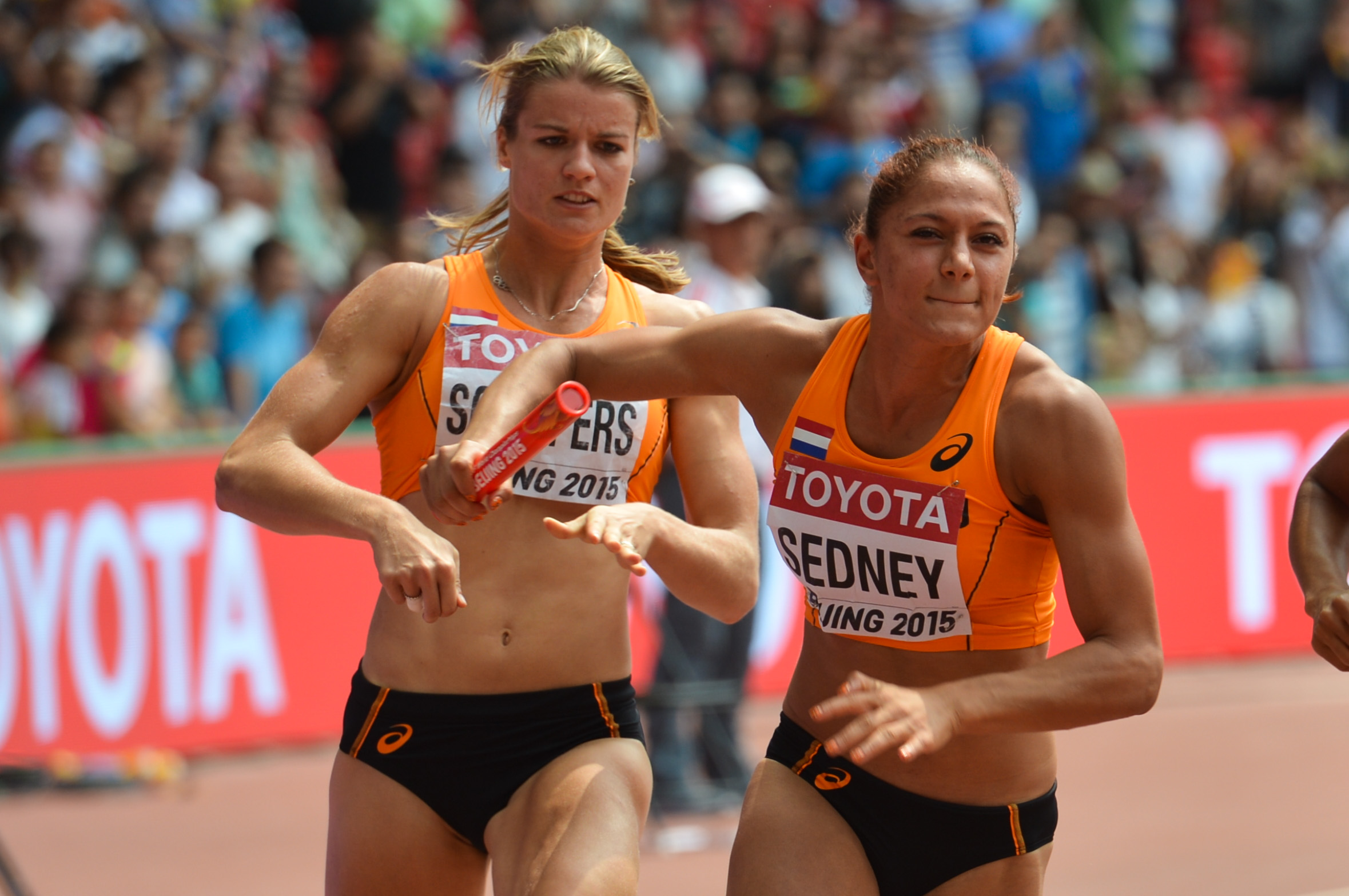 Naomi Sedney en Dafne Schippers tijdens de series 4 x 100 m estafette op de WK van 2015, Peking.